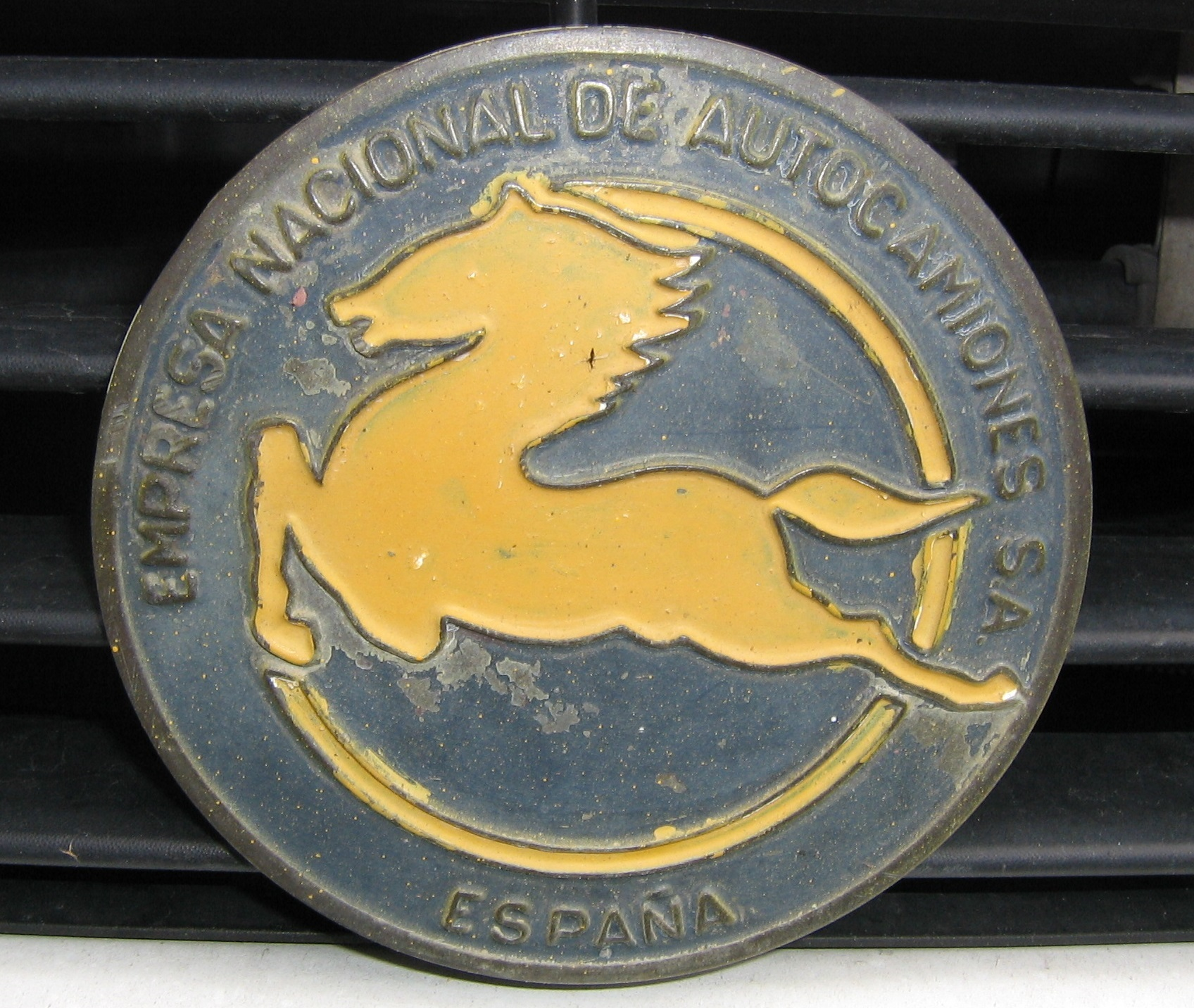 Logotipo de ENASA perteneciente a un Pegaso Comet.